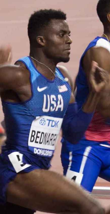 DOH30025 200m men heats